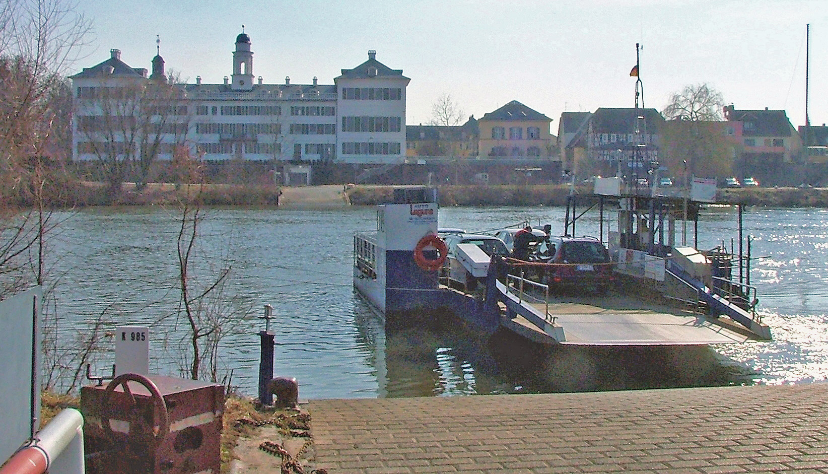 Mainfaehre im Stadtteil Rumpenheim, Offenbach am Main